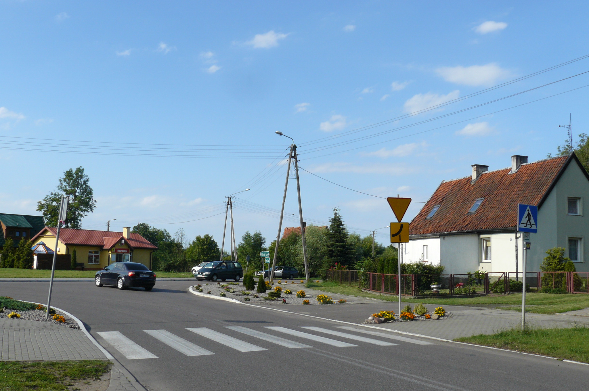 Lubieszewo (Żuławy).